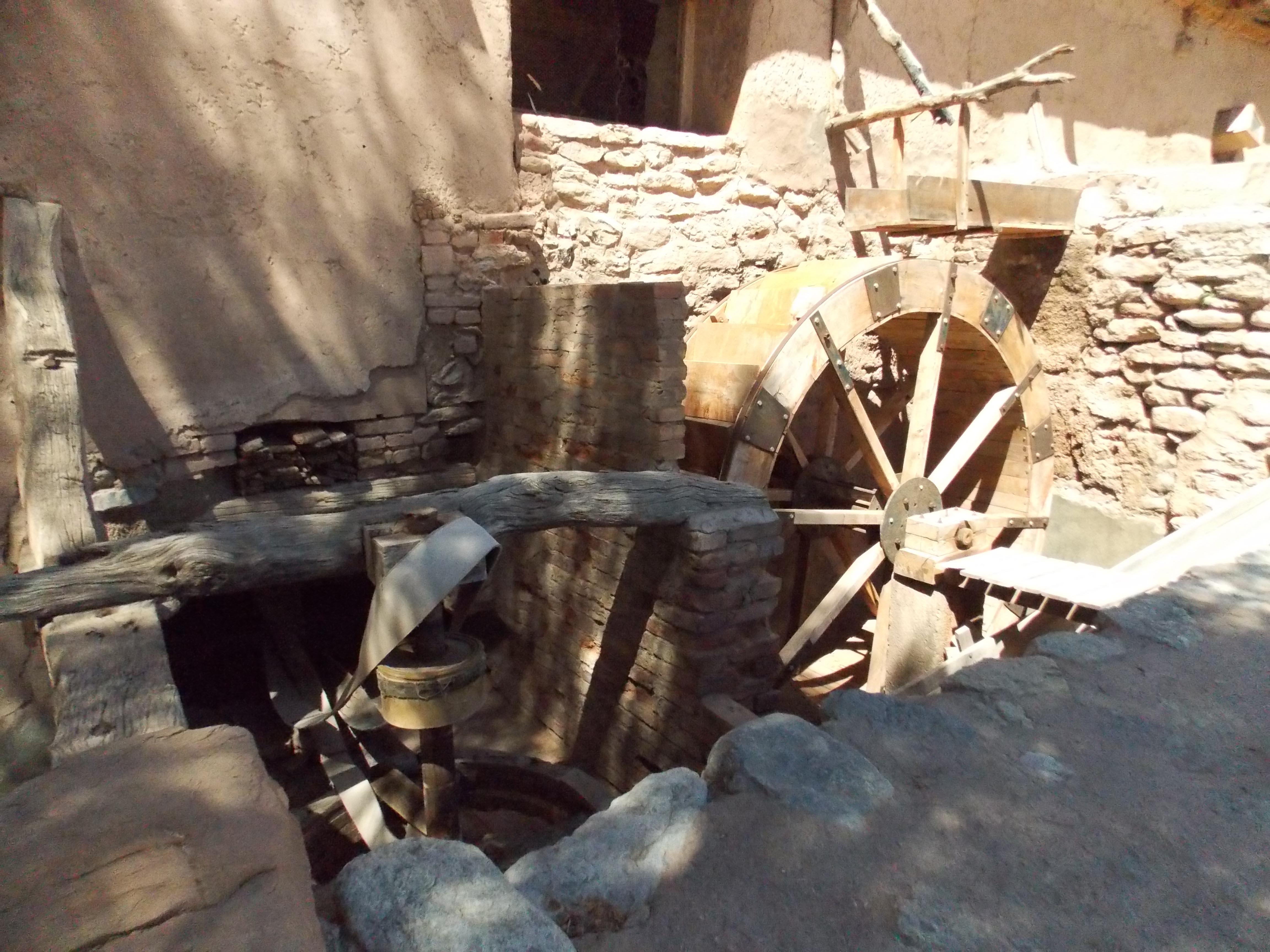 Molinos de San José de Jáchal